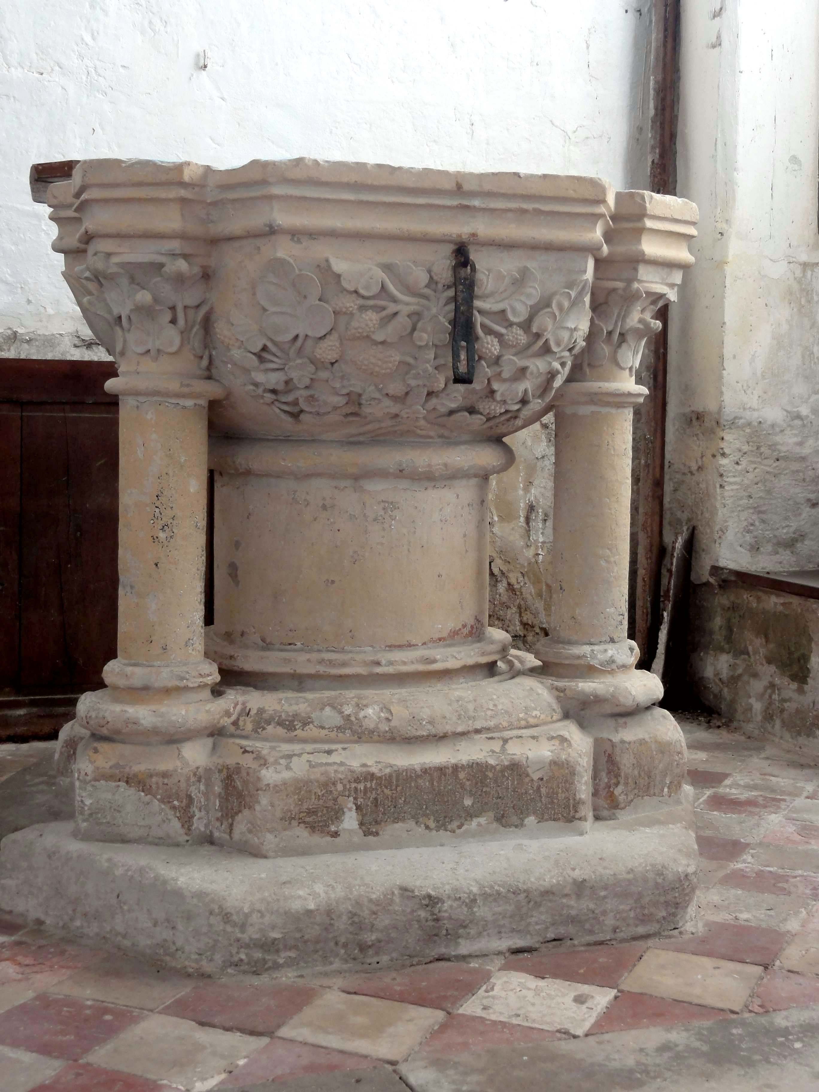 Mobilier de l'église - voir titre.